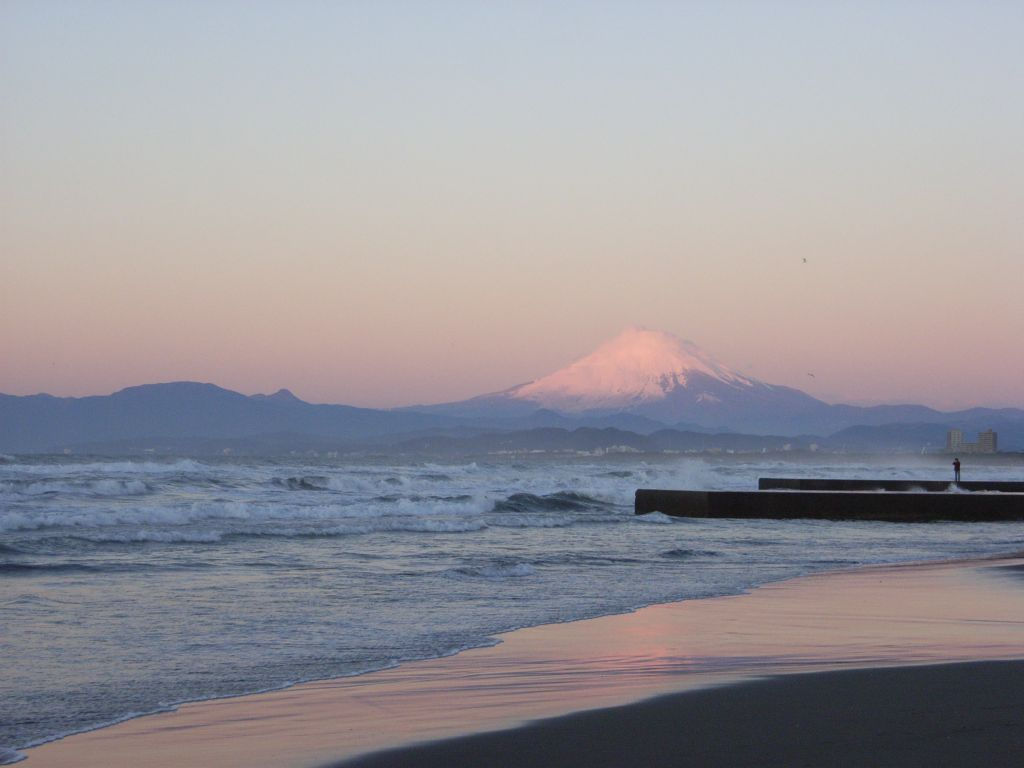 Enoshima beach, Kanagawa pref., Japan.